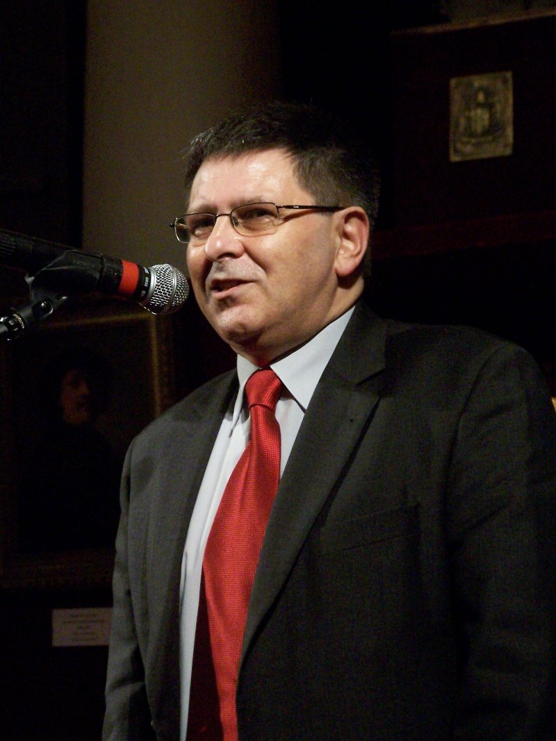 Włodzimierz Paszyński, zastępca prezydenta Warszawa, podczas uroczystości wręczenia nagród w konkursie "Kwiaty dla Babci i Dziadka", Galeria Porczyńskich, Warszawa